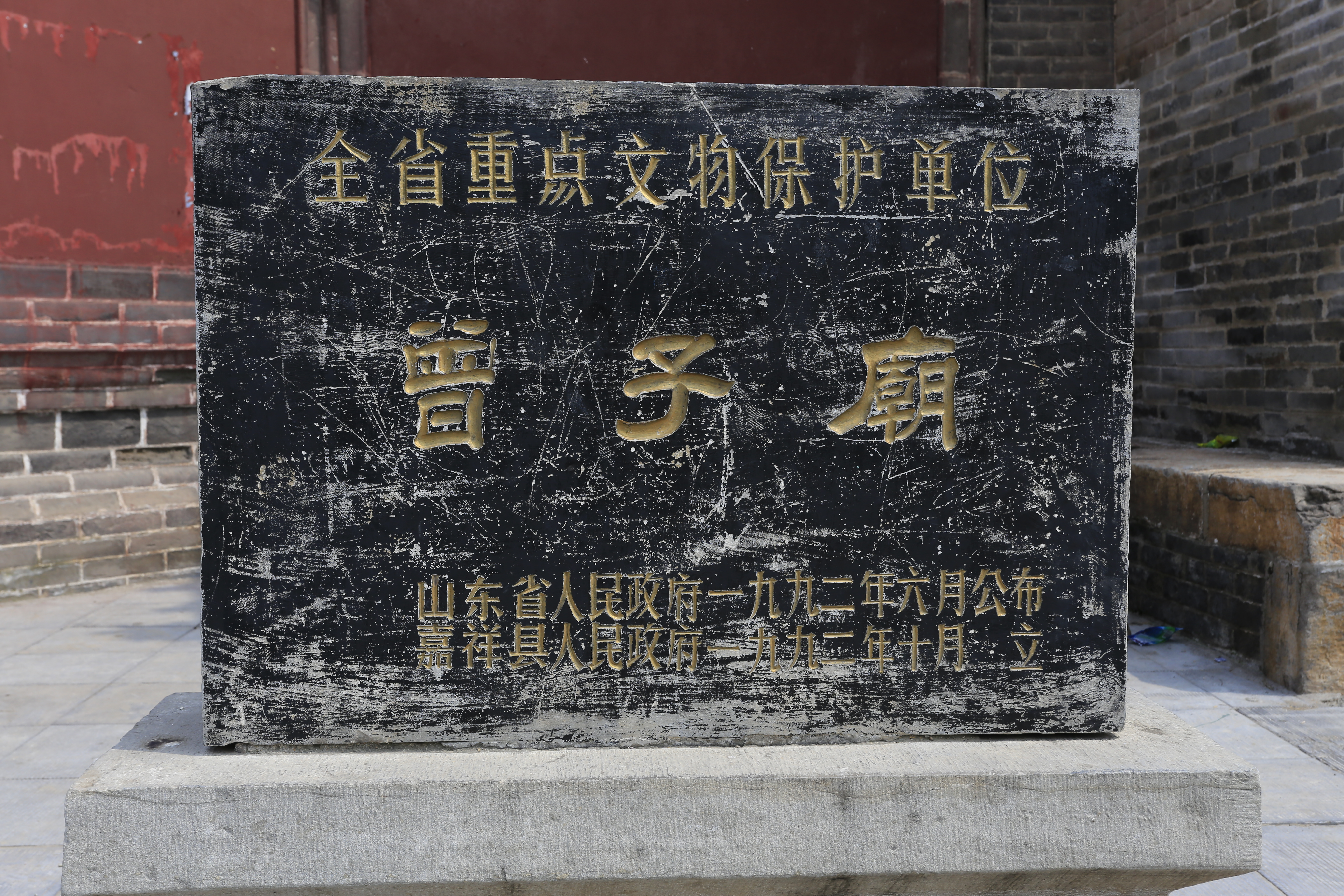 嘉祥曾庙—— 文保碑